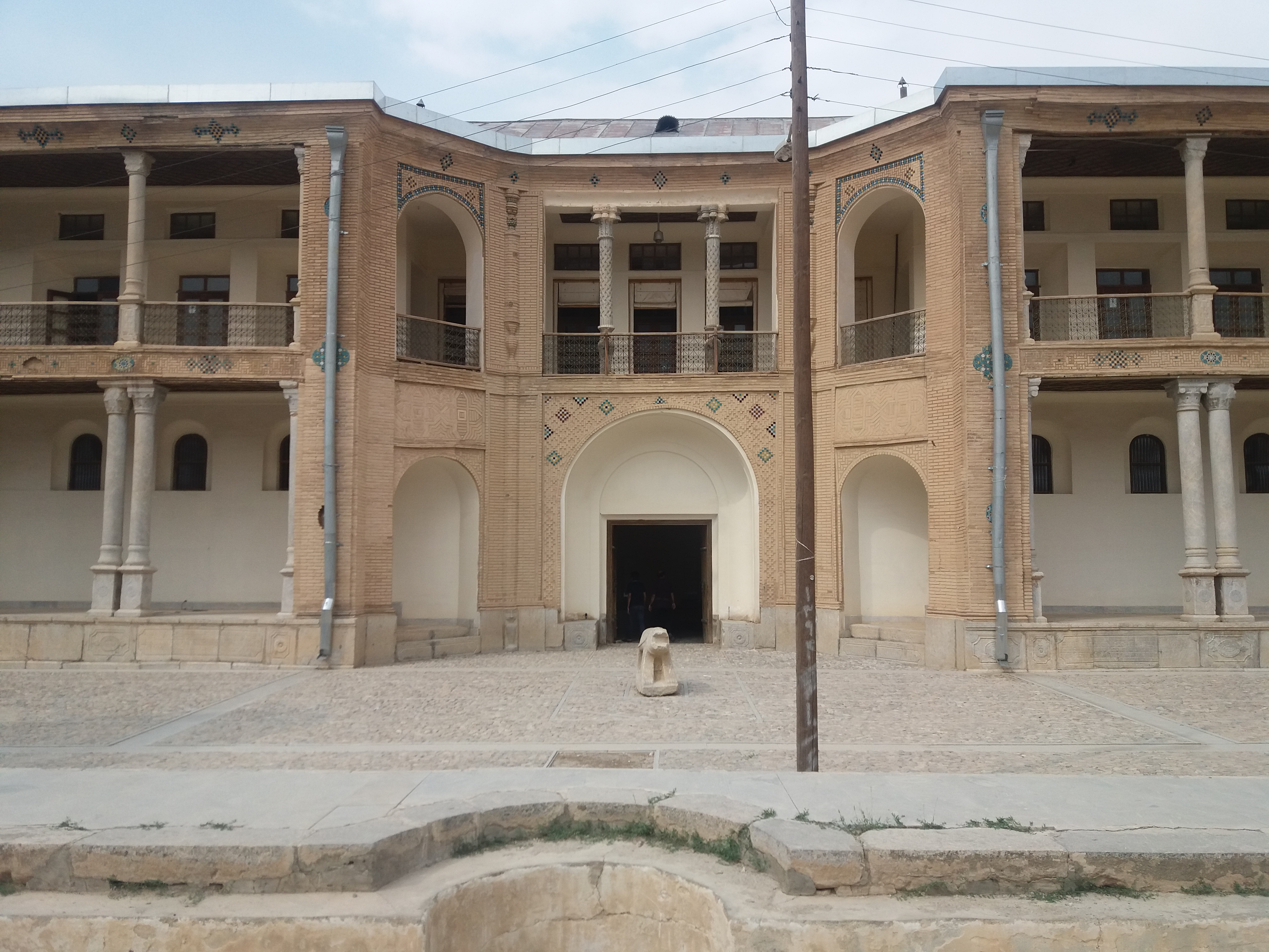 تصویرقلعه از حیاط بیرونی